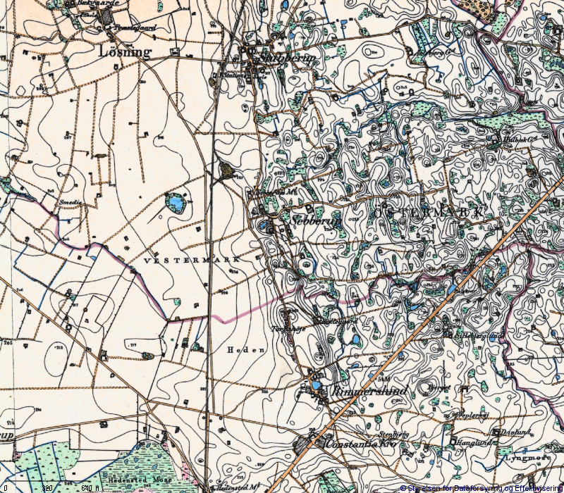 'Højt' målebordsblad med udsnit af Løsning hedeslette t.v. og dødislandskab t.h., adskilt af den Østjyske Israndslinje; kurveækvidistance 5 fod = 1,57 m; kortudsnit 4,2 x 3,7 km